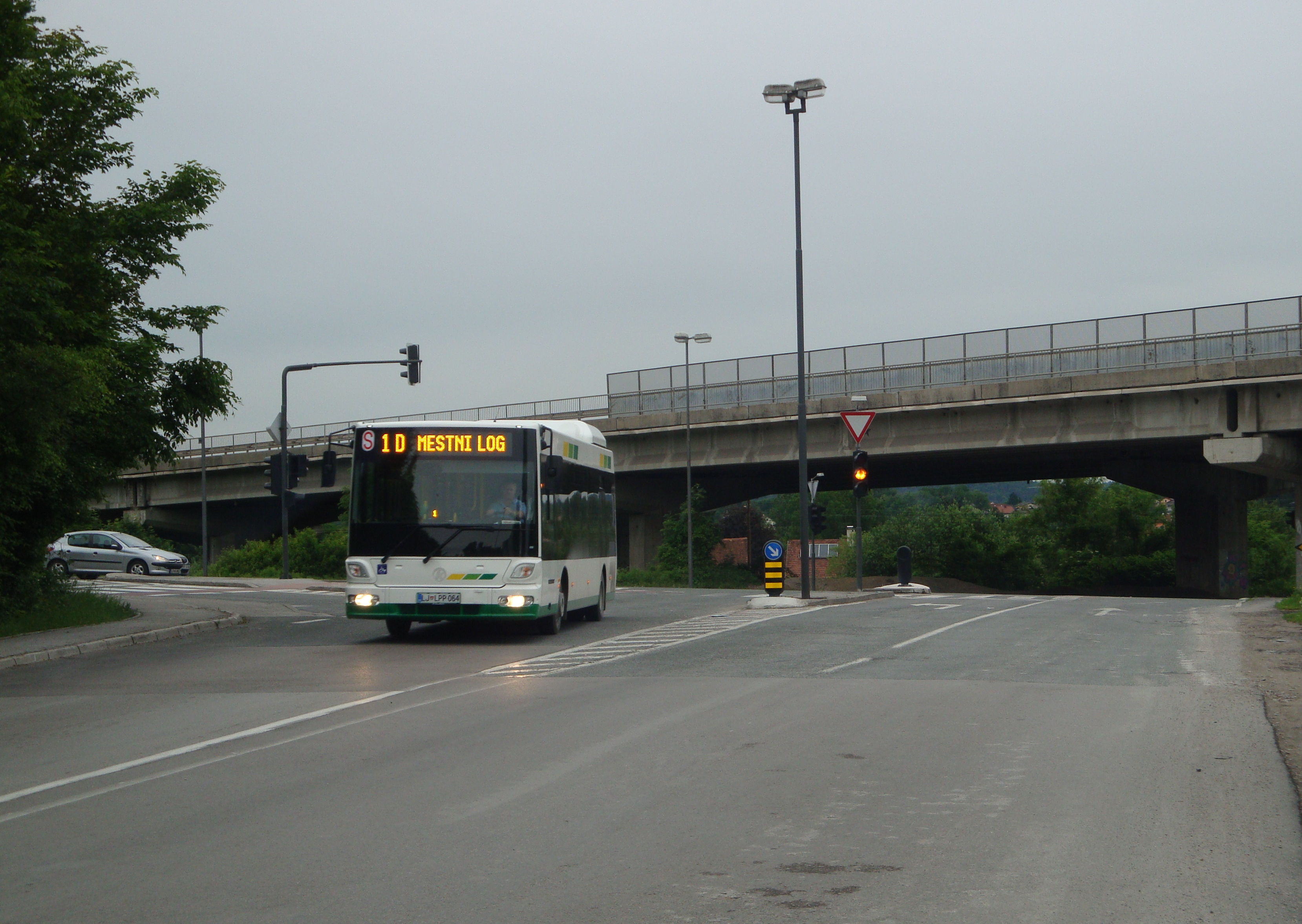 Nova mestna avtobusna linija – nov midi avtobus na Dolgem mostu.